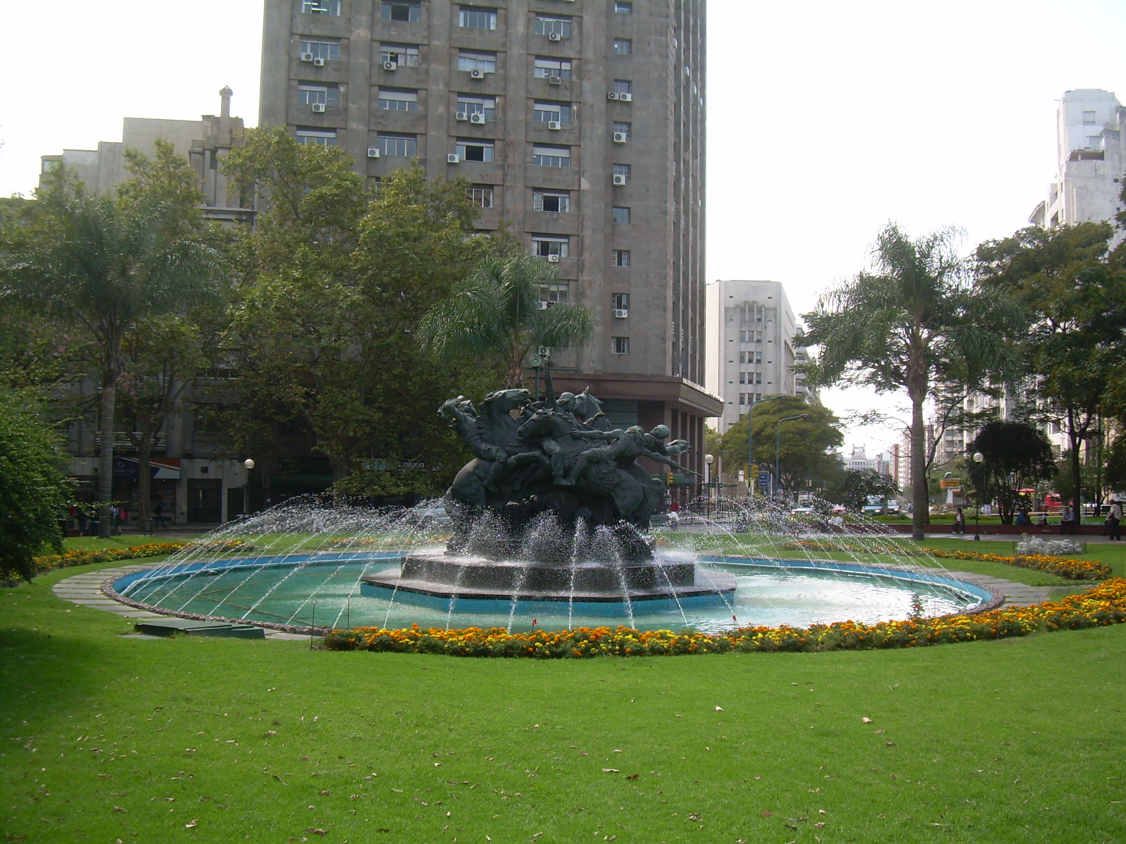 Praça do entrevero, Montevideo, Uruguay